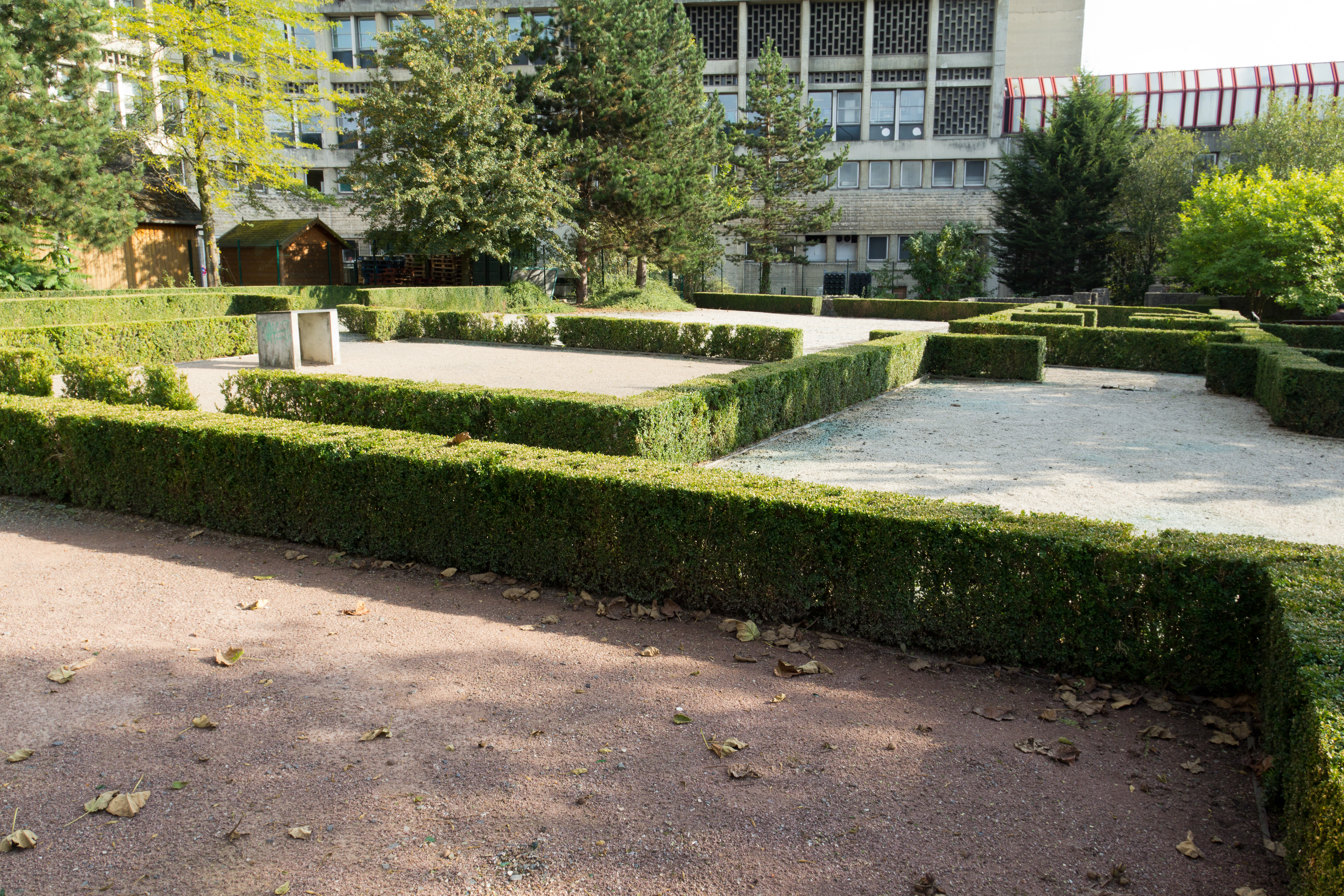 Site des vestiges gallo-romains de Lisieux. Les haies dessinent le plan des thermes enfouis. .